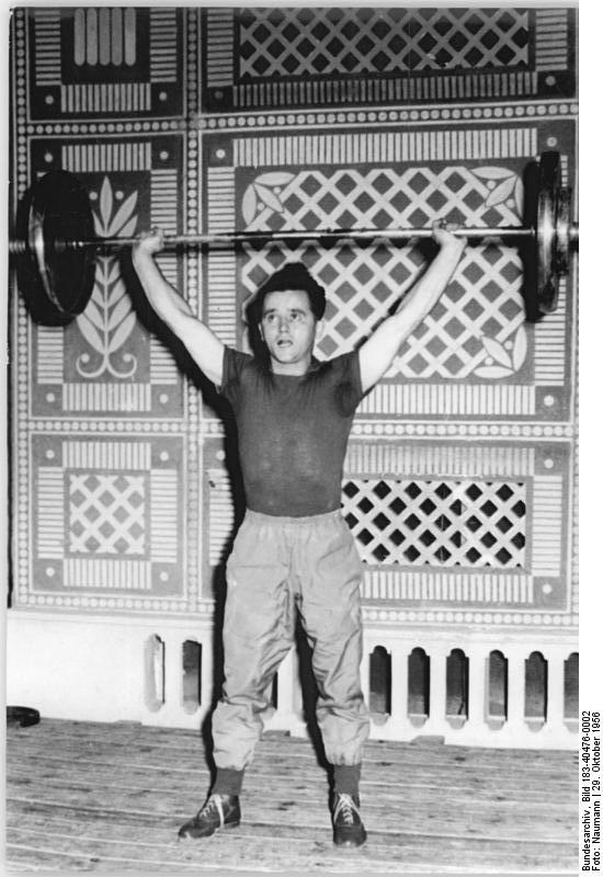 Georg Miske beim Training Zentralbild Leipzig Naumann 29.10.1956 Der deutsche Olympiateilnehmer George Miske (Gewichtheben) . Der deutsche Olympiateilnehmer George Miske wurde am 9.April 1928 geboren. Er gehört dem ZSK Vorwärts Berlin an. Er ist deutscher Rekordhalter im beidhändigen Drücken der Federgewichtsklasse mit 100 kg und im Olympischen Dreikampf mit 317,5 kg. Bei den Europameisterschaften 1956 in Helsinki belegte er den vierten Platz. UBz: Georg Miske während des Trainings .